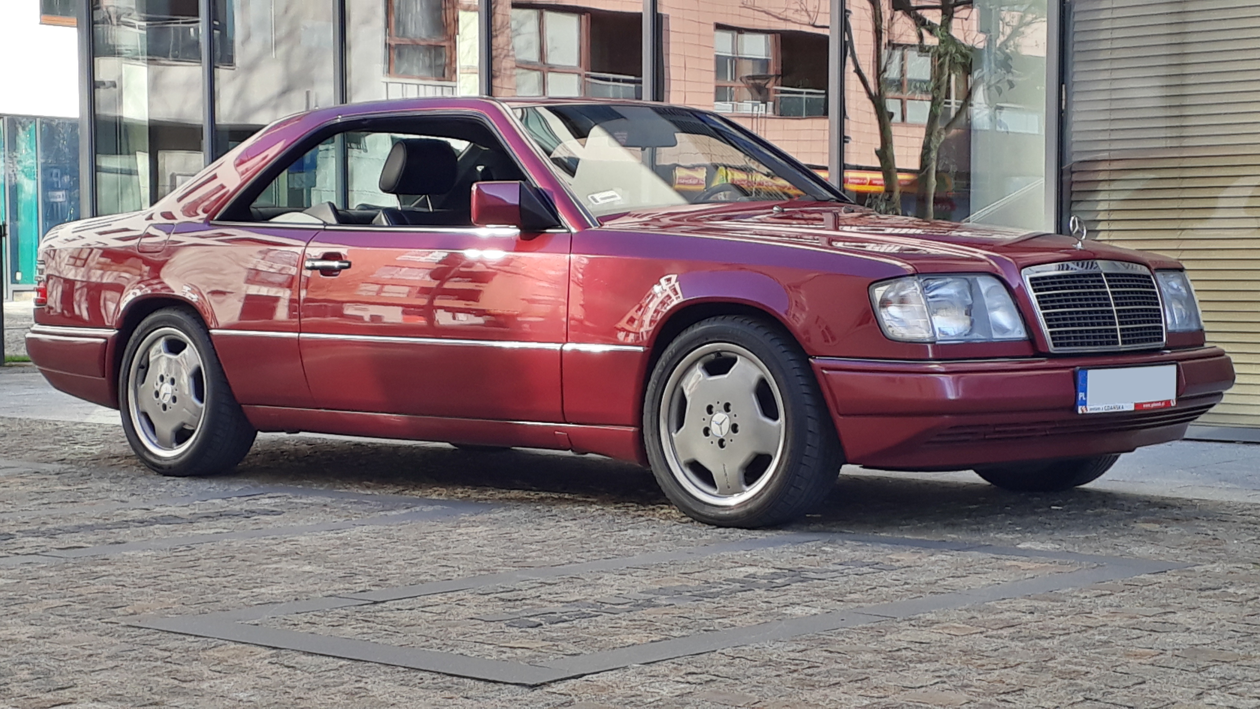 Mercedes C124 320CE, M104, 1994